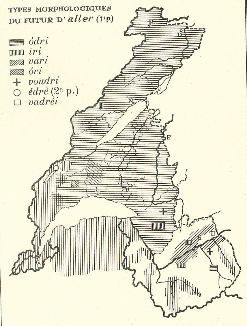 Varianten der Zukunftsform des Verbs «aller» in den Mundarten der französischsprachigen Schweiz, abgedruckt im Glossaire des patois de la Suisse romande, Band 1, Seite 290